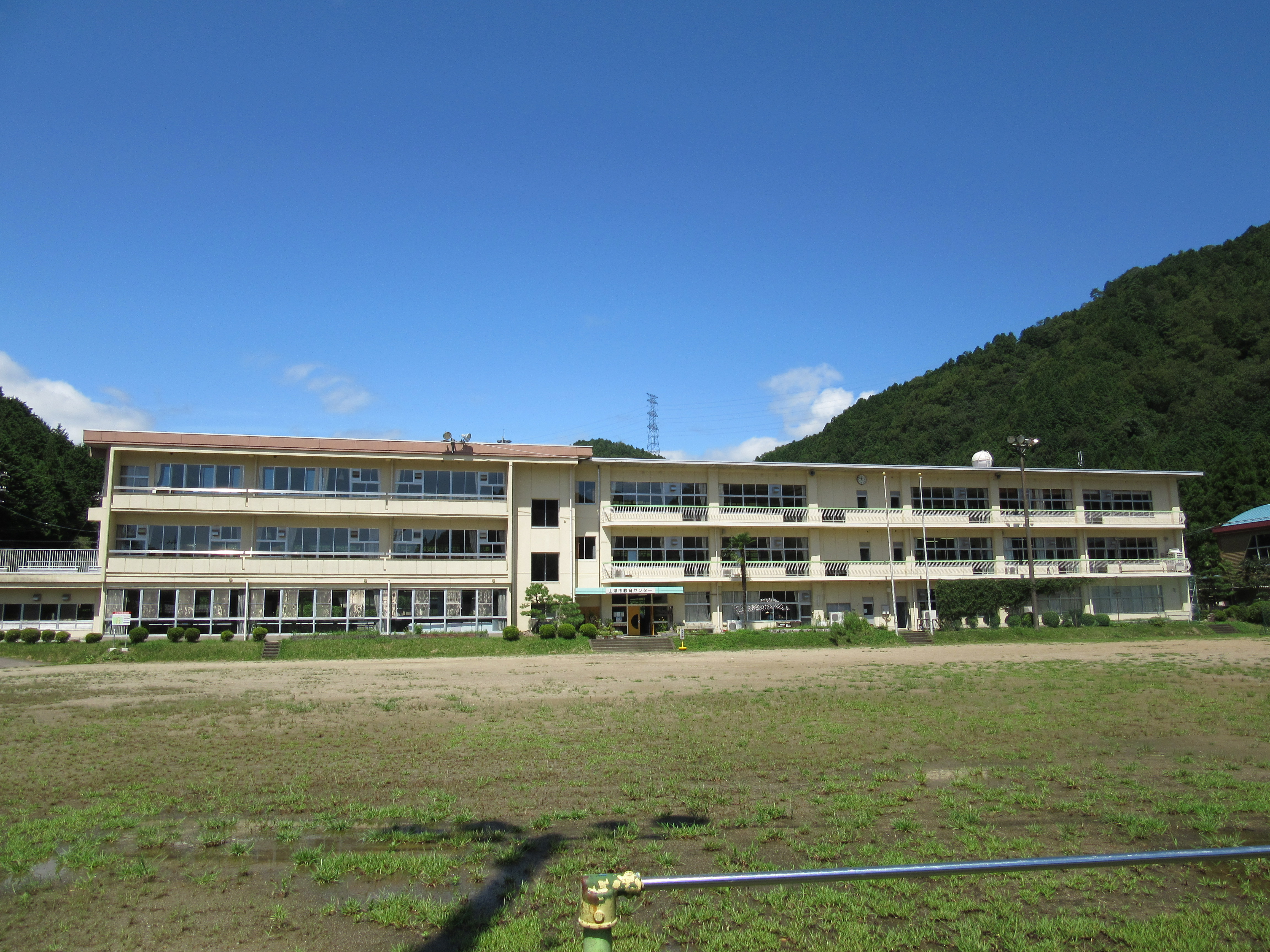 旧富波小学校